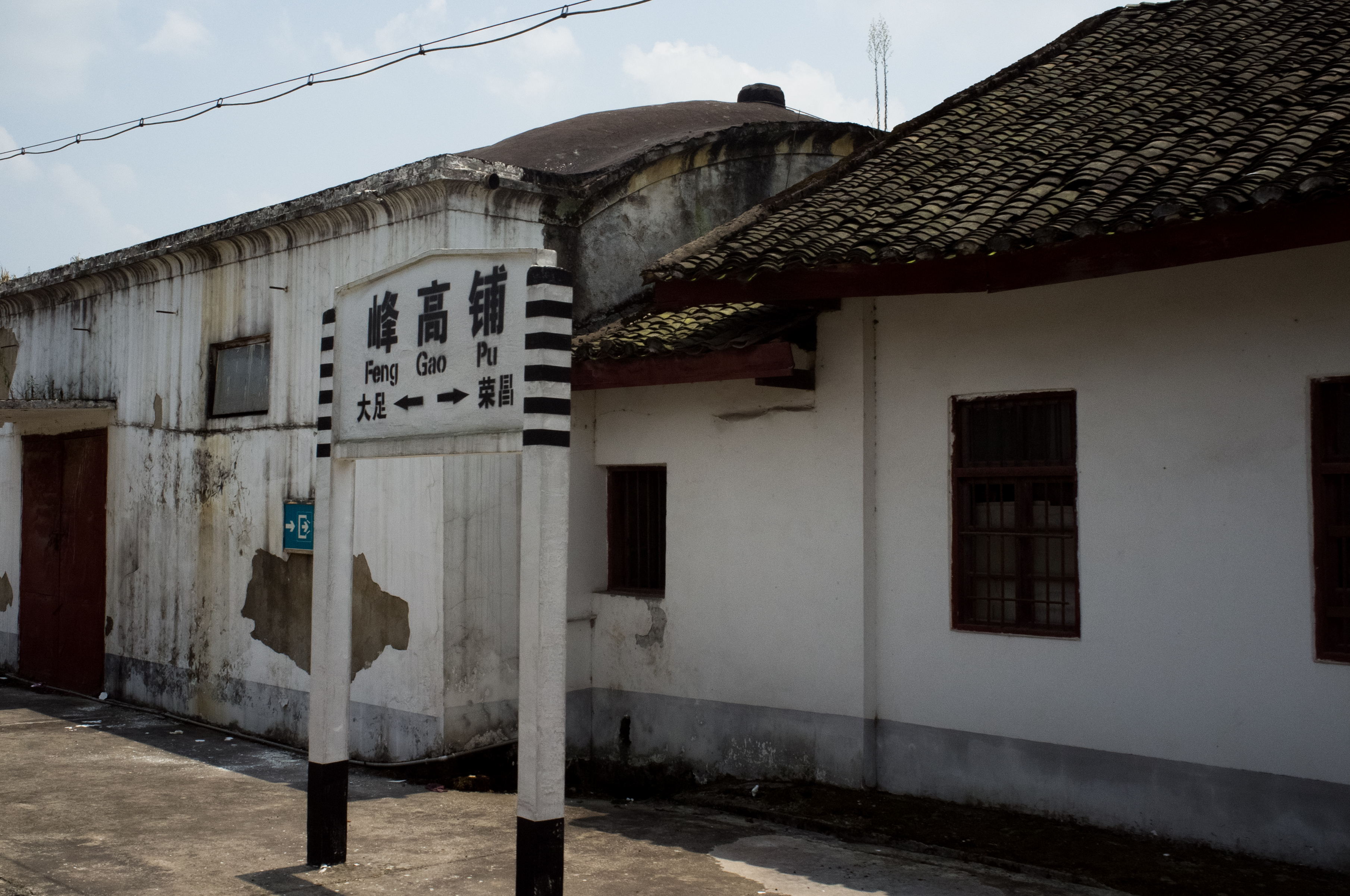 中文（中国大陆）: 成渝铁路峰高铺站